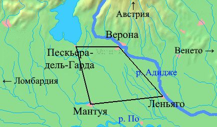 Quadrilatero